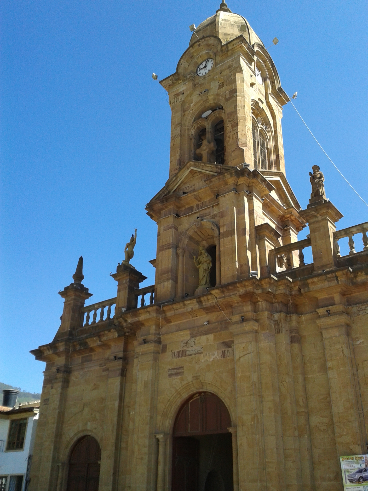 Iglesia principal del Municipio de Nobsa, fue construida entre 1915 y 9153